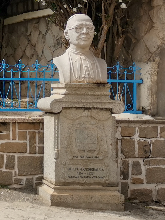 Büste von Kardinal Jérôme Rakotomalala vor der Kathedrale Marie Immaculée Conception à Andohalo